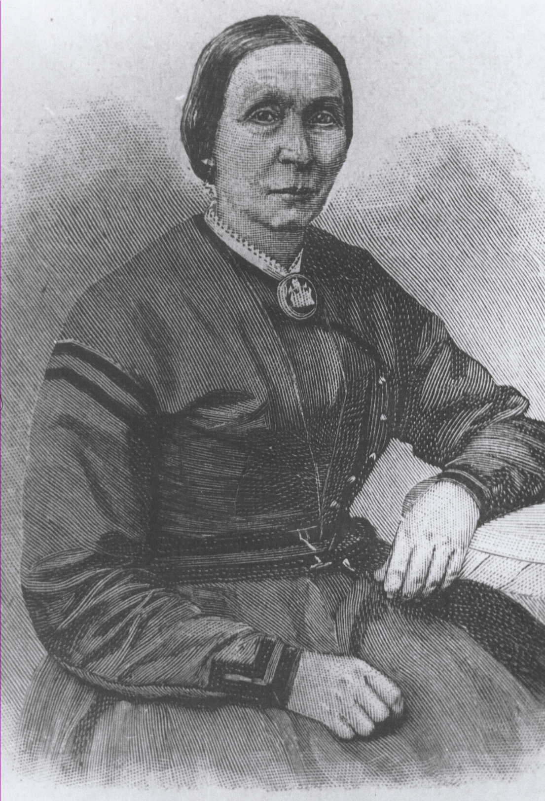 Die niederdeutsche Lyrikerin Alwine Wuthenow